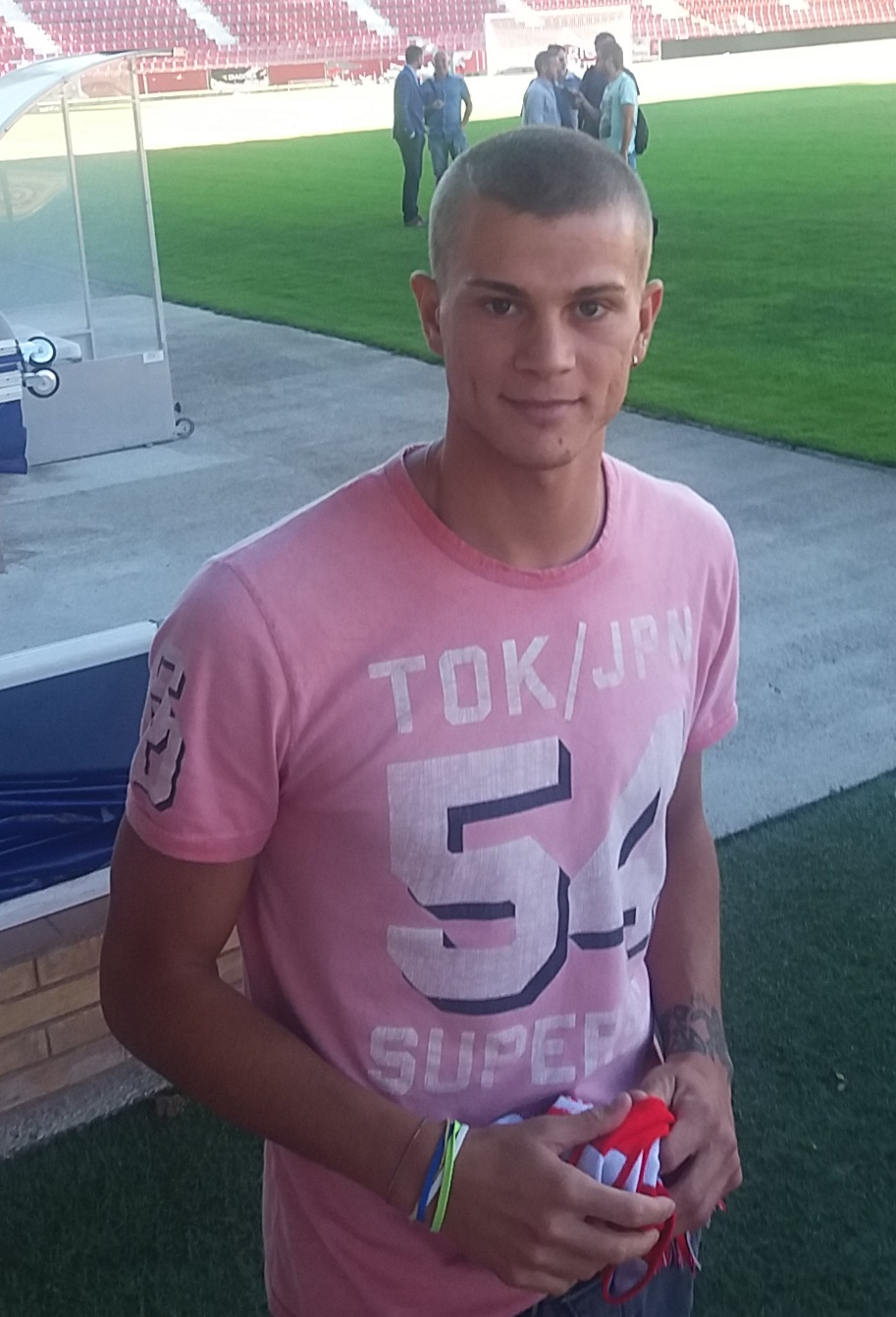 Samuele Longo en la presentación del Girona FC